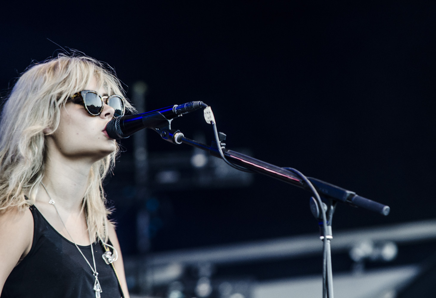 FIB 2014